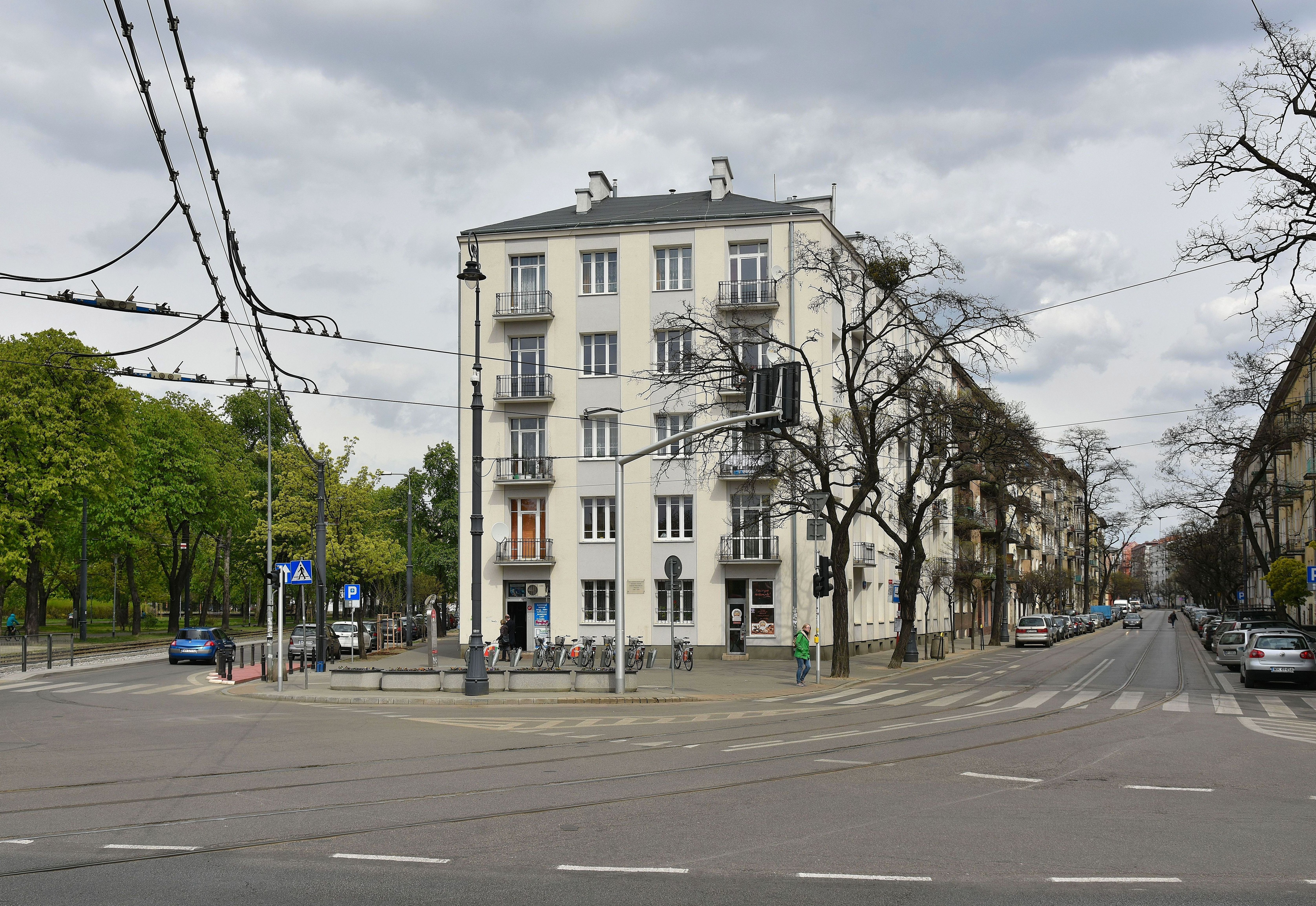 Skrzyżowanie ulic Inżynierskiej, Stalowej i 11 Listopada w Warszawie